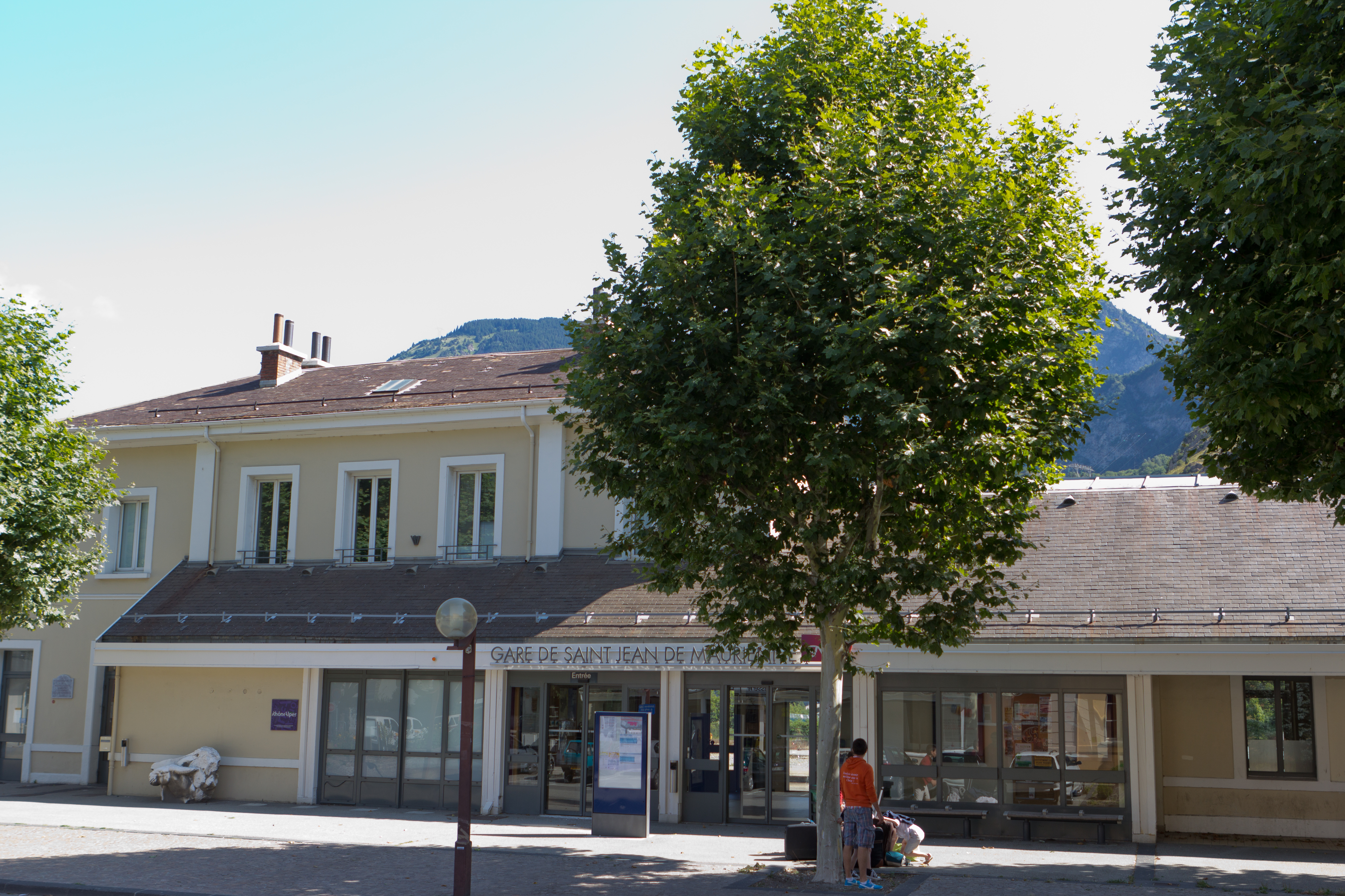 Gare de Saint-Jean de Maurienne, commune de Saint-Jean de Maurienne, département de la Savoie, France